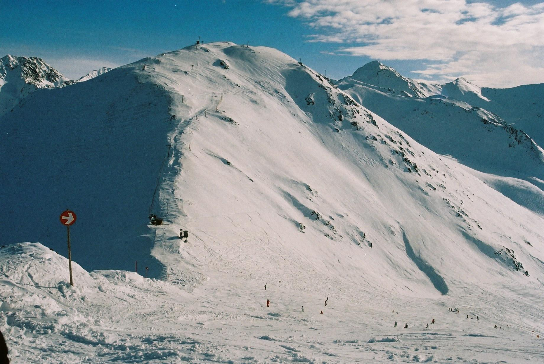 Gueserkopf 2.850 m in Nauders am Dreiländereck Österreich Schweiz Italien